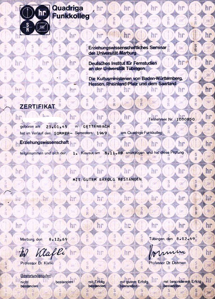 Zertifikat über die erreichten Punkte bei der ersten Klausur des Quadriga-Funkkollegs Erziehungswissenschaft (1969)